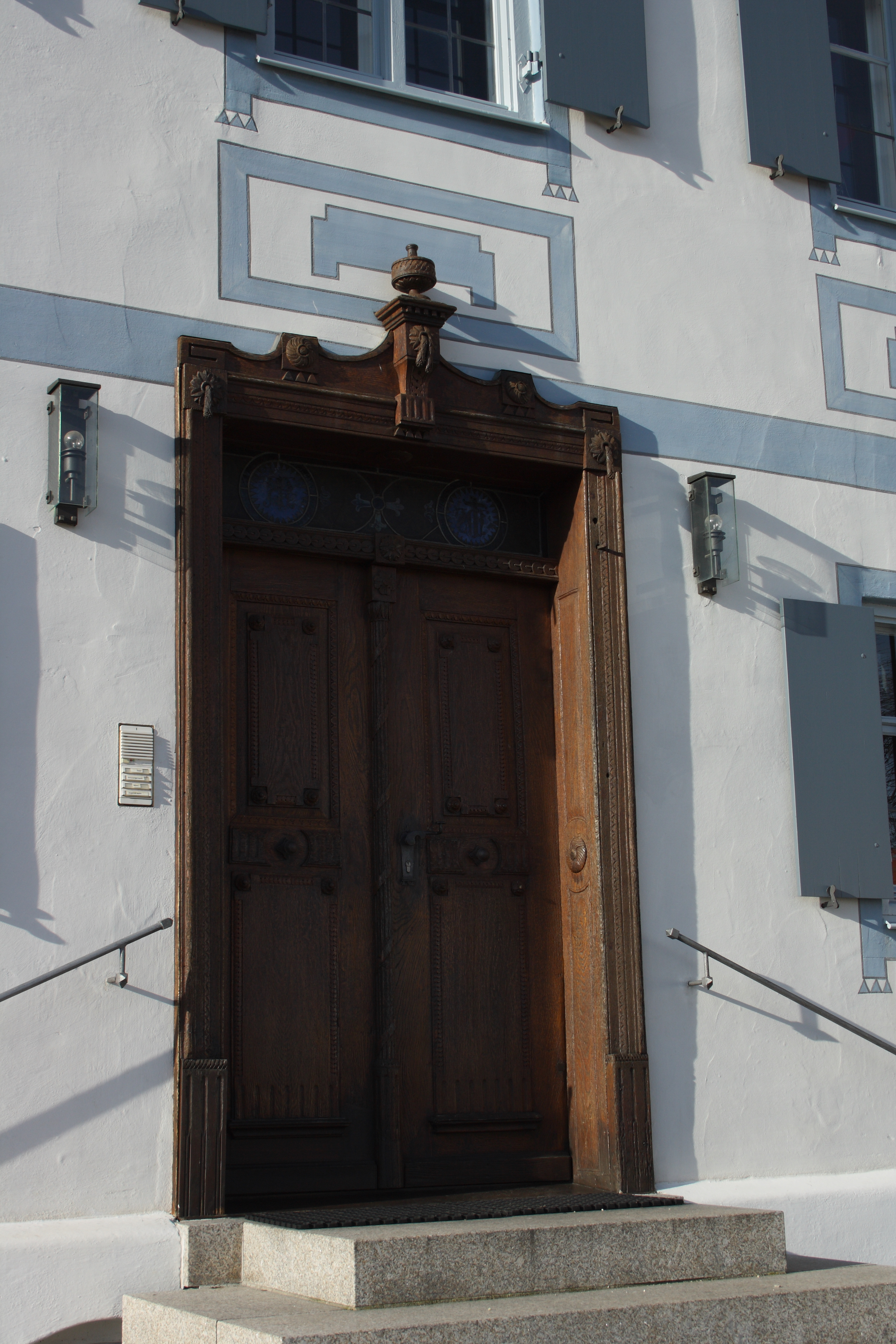 Pfarrhaus in Winterbach im Landkreis Günzburg (Bayern), Ende 18. Jahrhundert, Tür